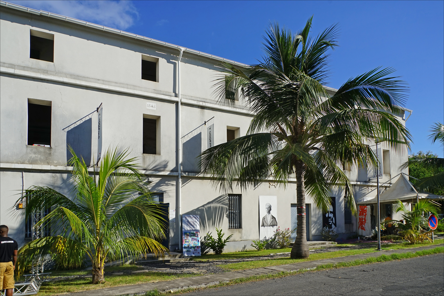 Le musée de Mayotte (MuMa) est, depuis septembre 2015, en préfiguration dans un bâtiment du quartier historique "le Rocher" de Dzaoudzi. L'édifice a été construit en 1845 pour servir de caserne aux militaires français en poste dans la colonie de "Mayotte et dépendances". Le bâtiment, auquel le dernier étage a été ajouté en 1890, a abrité à partir de 1946, les finances, l'internat du collège, la poste et les archives. Le rez-de-chaussée a été réaménagé en 2014-2015 pour accueillir le musée. Dans les années qui viennent, il est prévu que le musée soit définitivement installé dans l'hôtel du gouverneur (la Résidence) construit sur "le Rocher" à l'emplacement du palais du sultan Andriantsouly qui a vendu Mayotte à la France en 1841. L'hôtel du gouverneur, actuellement inhabitable, est en attente de restauration par les pouvoirs publics. L'inauguration du musée en 2015 Le musée de Mayotte dépend du conseil départemental de Mayotte (101ème département français depuis le 31/03/2011) Photo ancienne du bâtiment sur la base Ulysse du CAOM